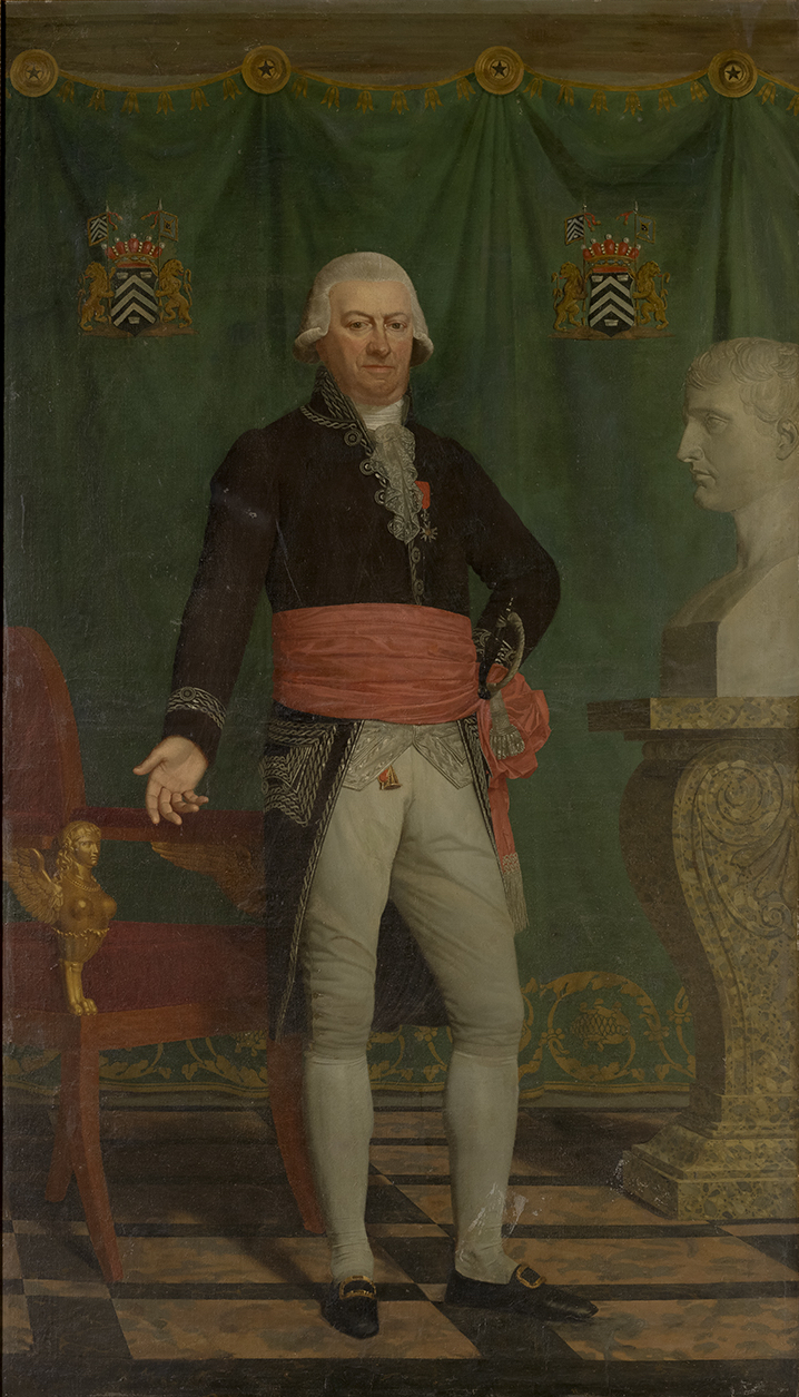 Portret van burggraaf Karel Aeneas de Croeser, burgemeester van Brugge (Joseph Octave van der Donckt, 1809); collection: Musea Brugge - Groeningemuseum